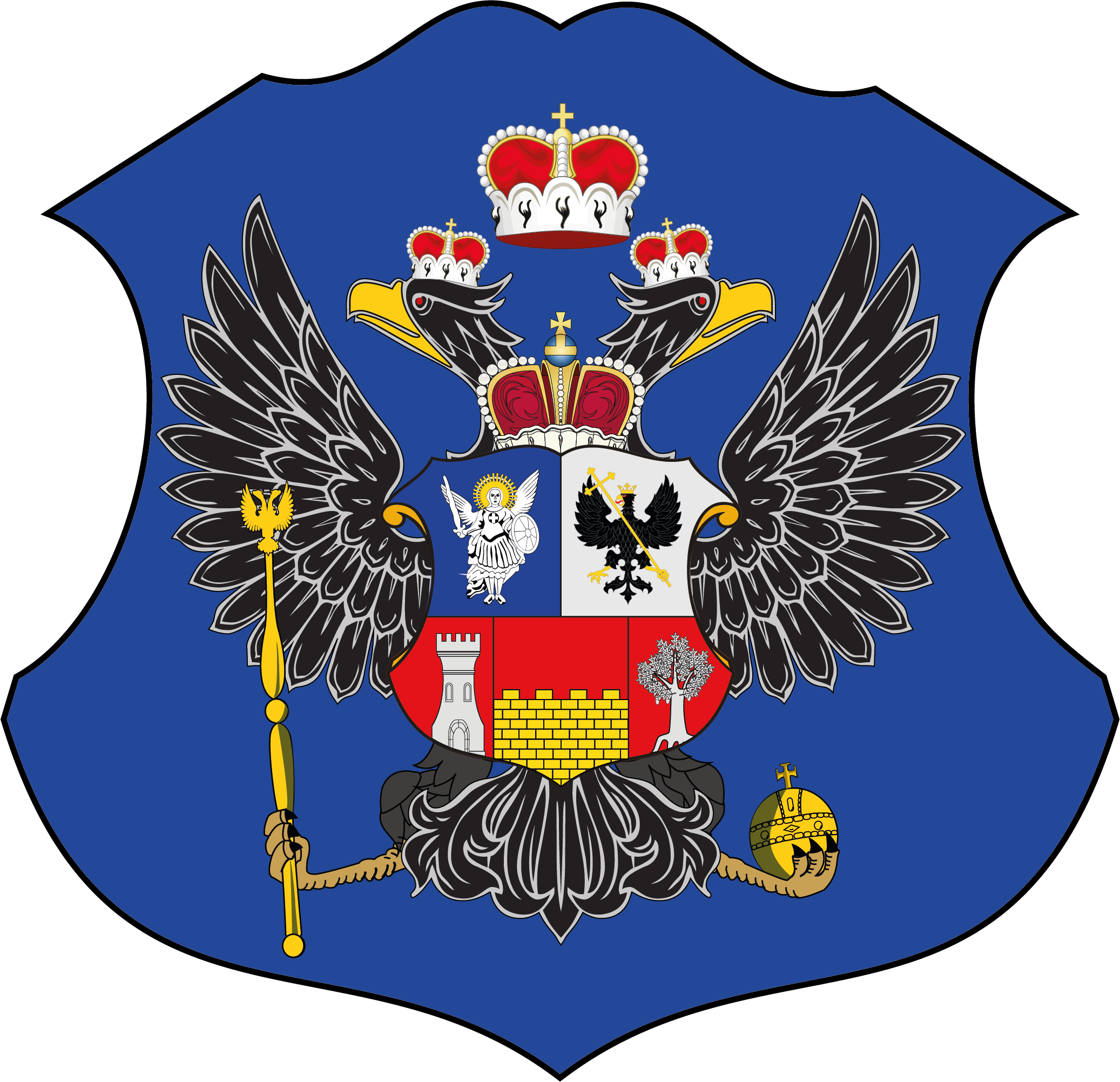 Герб Малої Росії (часів ІІ Малоросійської колегії)